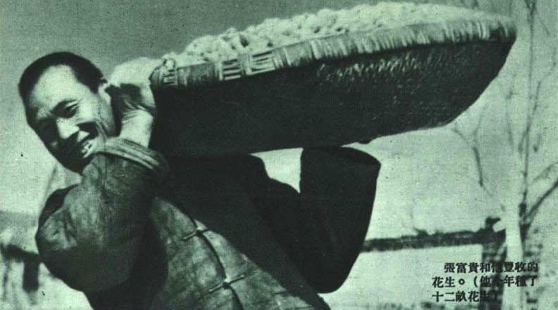 1950年的张富贵，山东著名的劳动模范